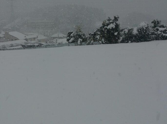 横浜市旭区の積雪